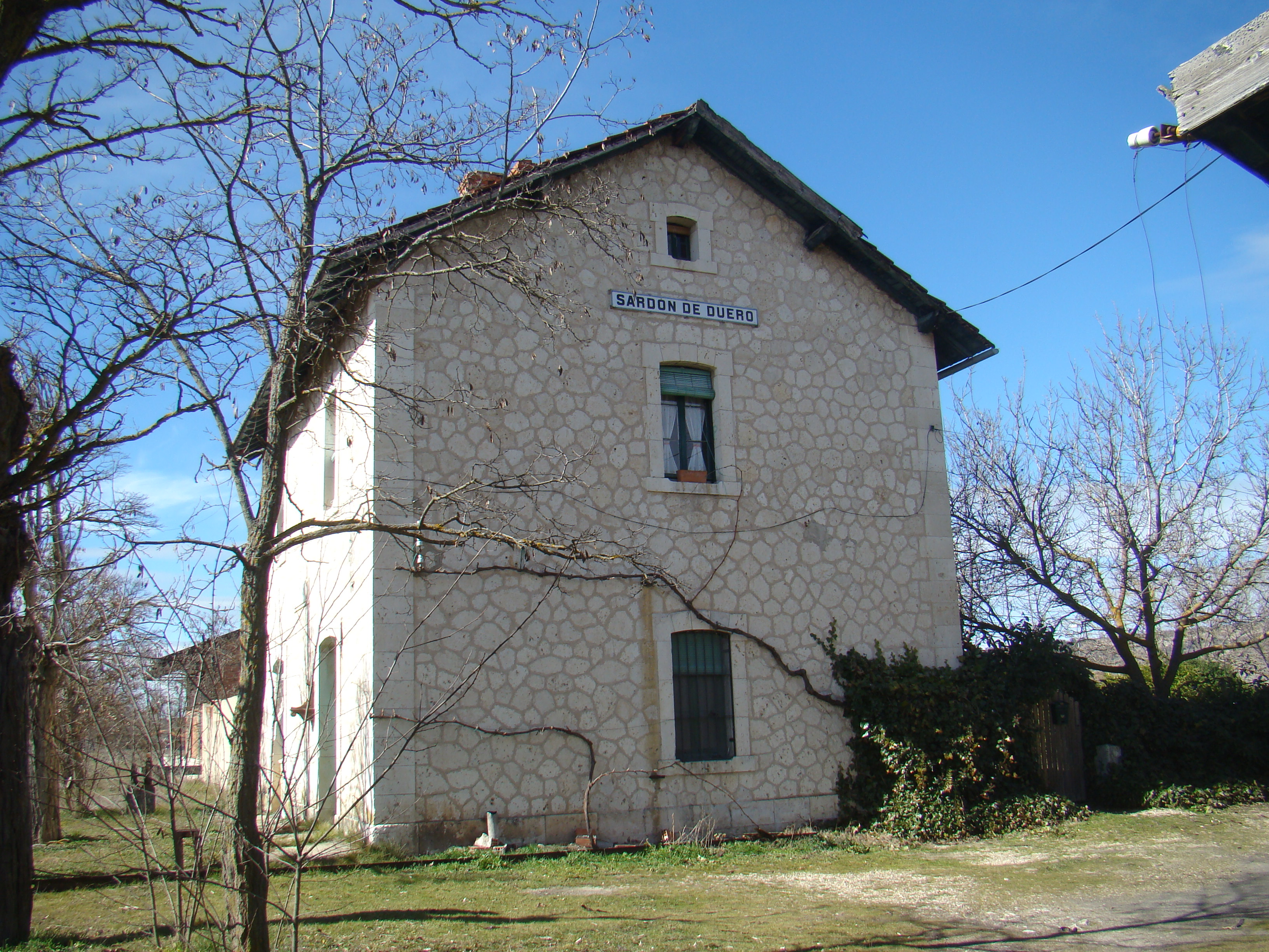 Sardón de Duero, Valladolid, España. Ferrocarril Valladolid Ariza. Edificio de la estación de Sardón de Duero.